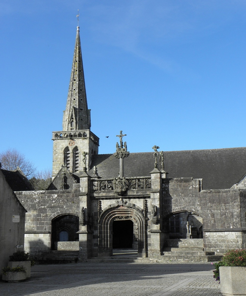 Porte triomphale et église Saint-Salomon de l'enclos paroissial de La Martyre (29).